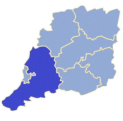 Powiat krośnieński (województwo lubuskie) - Gmina wiejska Gubin